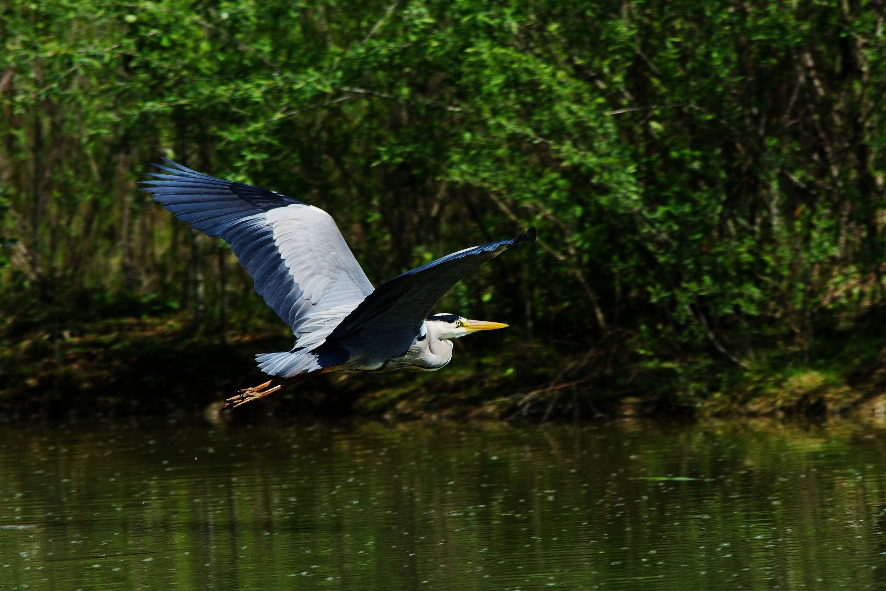 Oasi WWF delle Cave di Noale, Noale, in provincia di Venezia (Veneto, Italia)